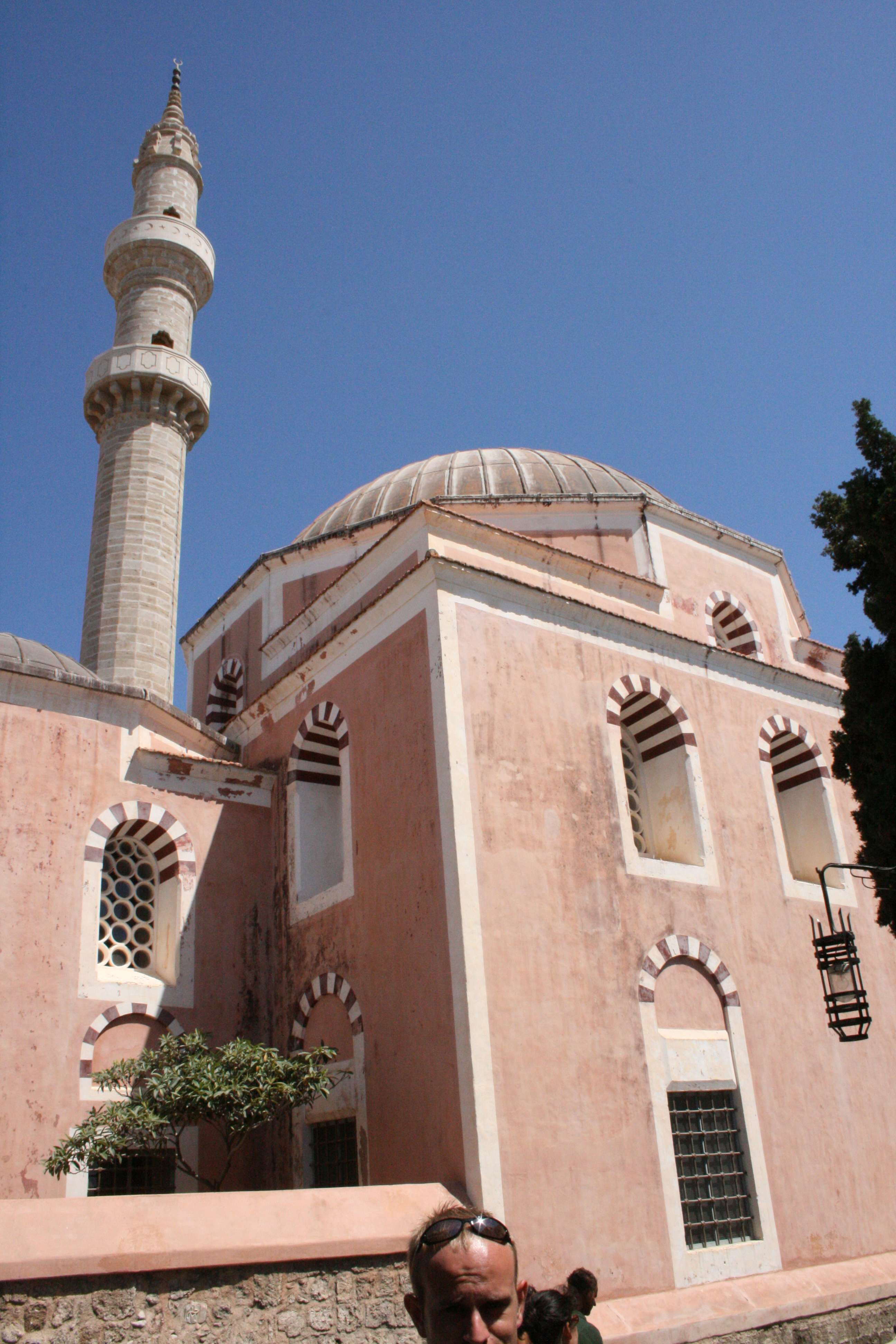 Rodi: Moschea di Solimano II (il Magnifico)